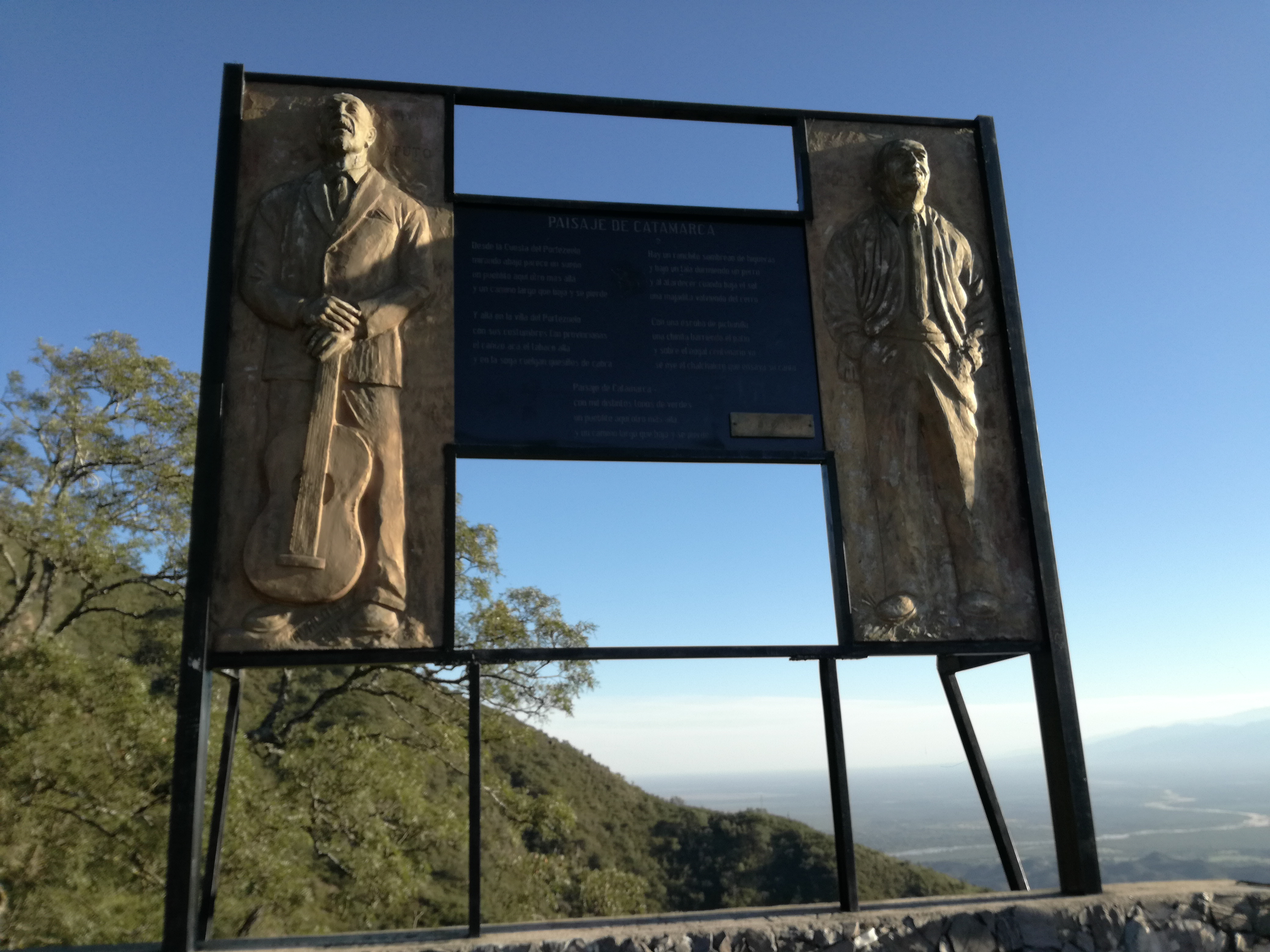 Monumento a la zamba Paisajes de Catamarca